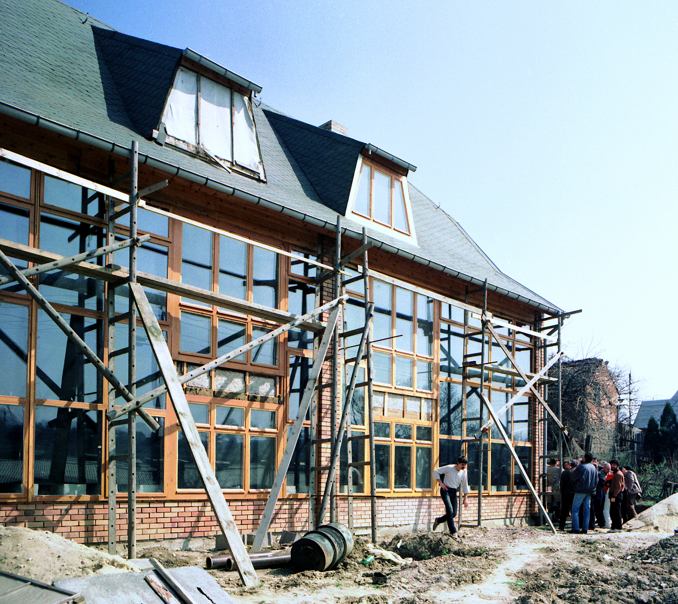 12.04.1988 DDR 5301 [99428] Hopfgarten (Thüringen), Am Weinberg (GMP: 50.986415,11.228131): Einfamilien-Doppelhaus. Erstes passives Solarhaus nach Plänen der Dozenten Dr. Gerhard Lindner und Dr. Jochen Gronau von der Hochschule für Architektur und Bauwesen Weimar. Im Unterschied zu anderen Sonnenhäusern, wo vor allem Solarzellen und Wärmepumpen für die Umwandlung der Sonnenenergie sorgen, sind es hier ausschließlich bauliche Mittel, die die erwünschte Wärmeumwandlung sichern soll. Hinter der nahezu total verglasten Südaußenwand befinden sich schwarze Aluminiumplatten, die als Absorber dienen und die Luft im Spalt zwischen Glas und Absorber erwärmen, zur Zirkulation bringen und damit direkt die Räume beheizen. Das Wirkprinzip ist die Trombe-Wand, die von dem französischen Ingenieur Félix Trombe zusammen mit dem Architekten Jacques Michel 1956 in Font-Romeu-Odeillo-Via entwickelt wurde. [R19880410D0012.TIF]19880412080NR.JPG(c)Blobelt